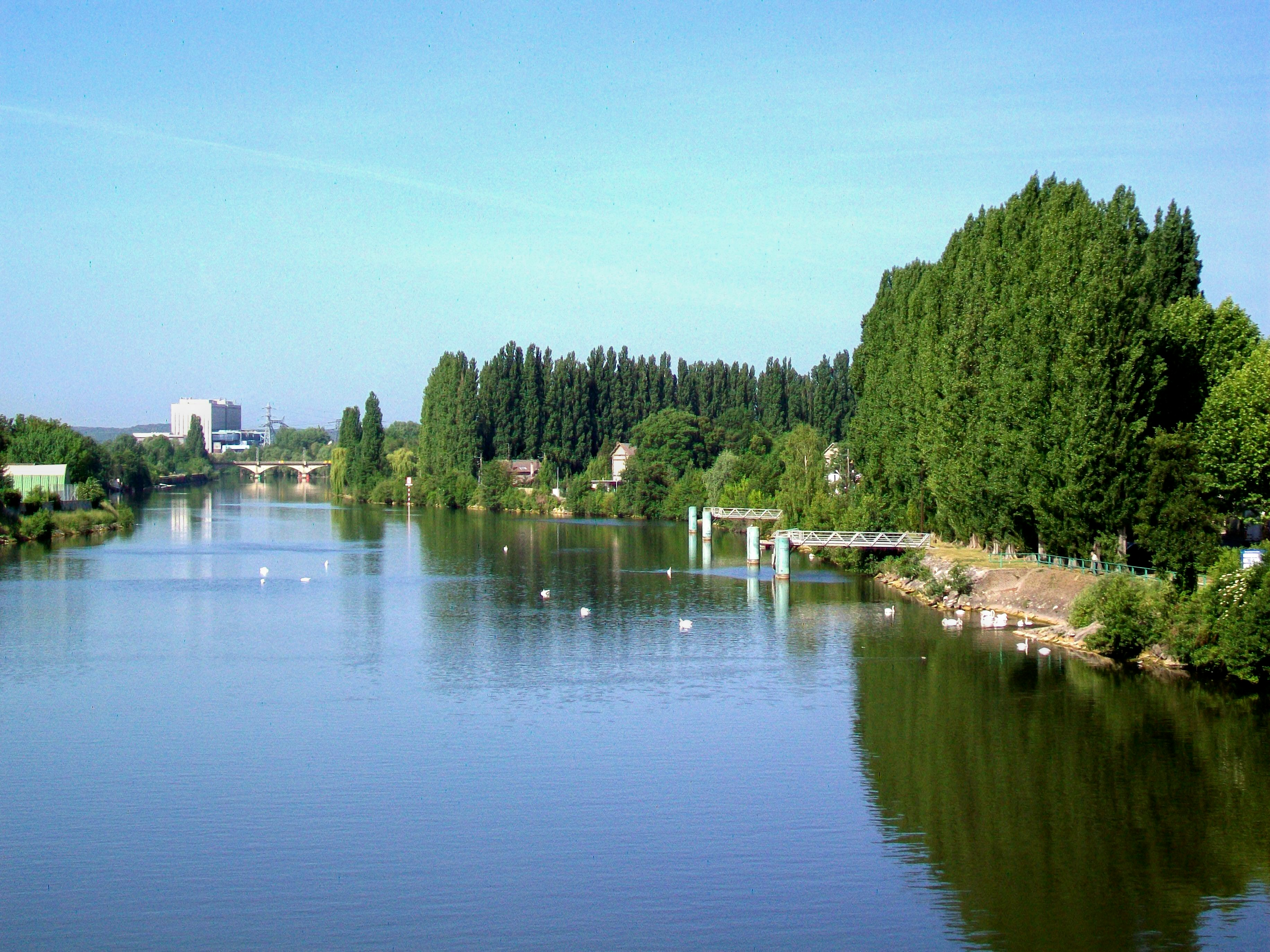 L'Oise à Persan (rive droite), depuis le pont entre Persan et Beaumont-sur-Oise.